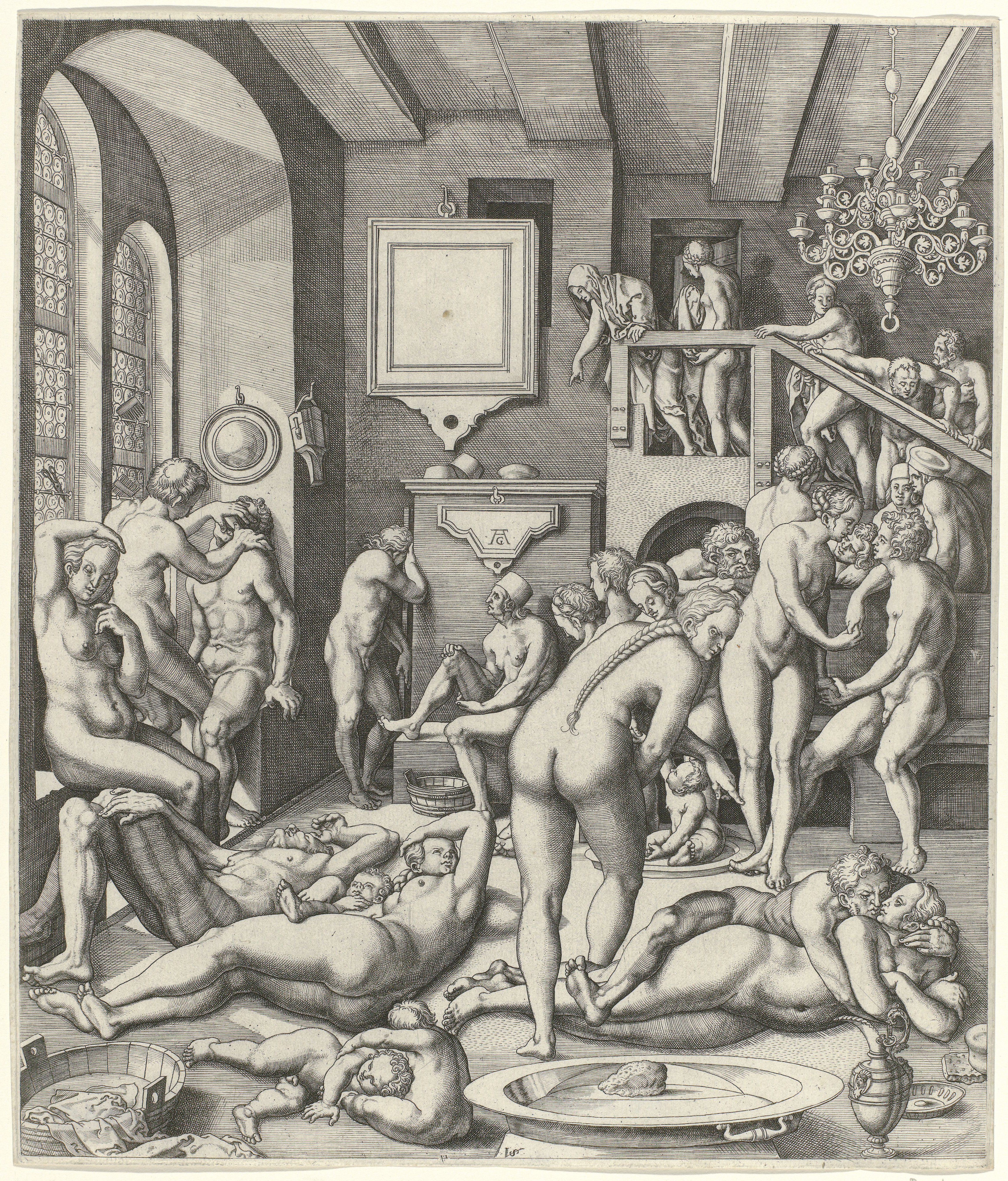 Kupferstich des Inneren eines Badehauses mit Männer und Frauen.